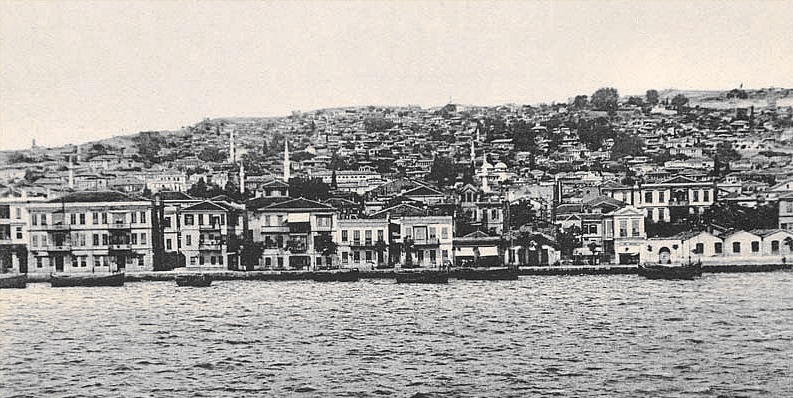 Le front de mer de Thessalonique, 1916